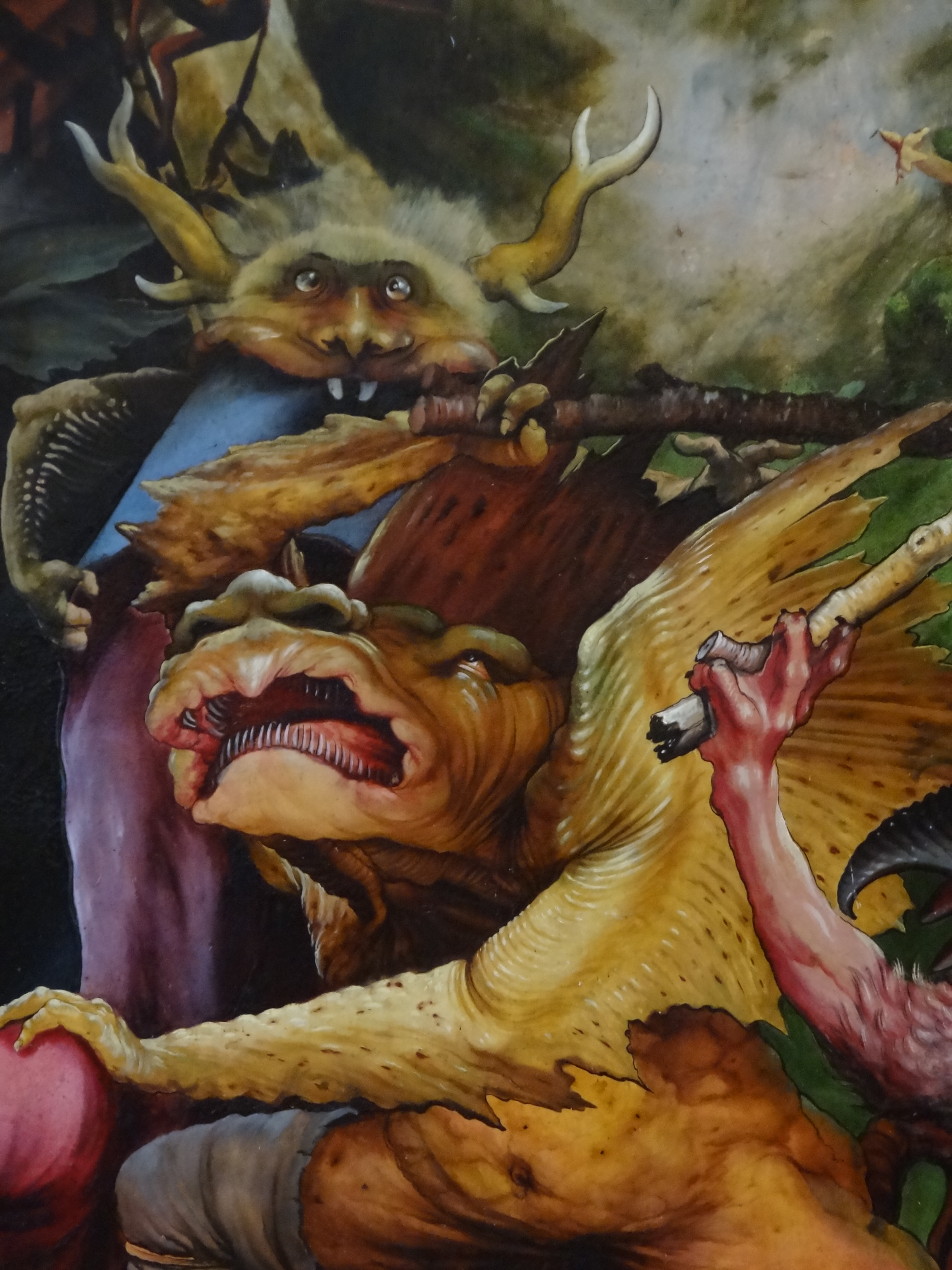 Colmar